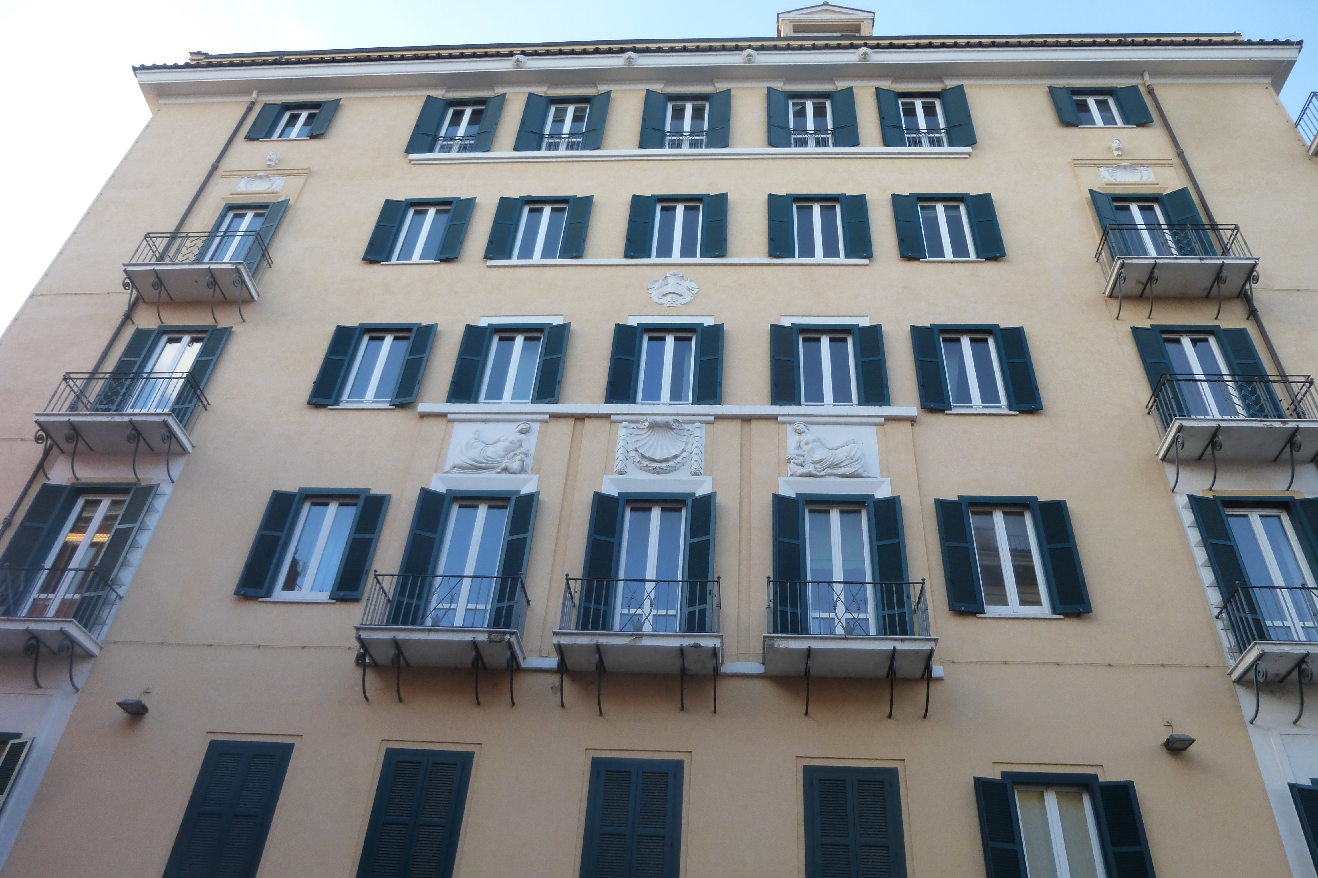 Roma, lungotevere degli Anguillara 9, immobile per abitazioni (Marcello Piacentini, 1925)